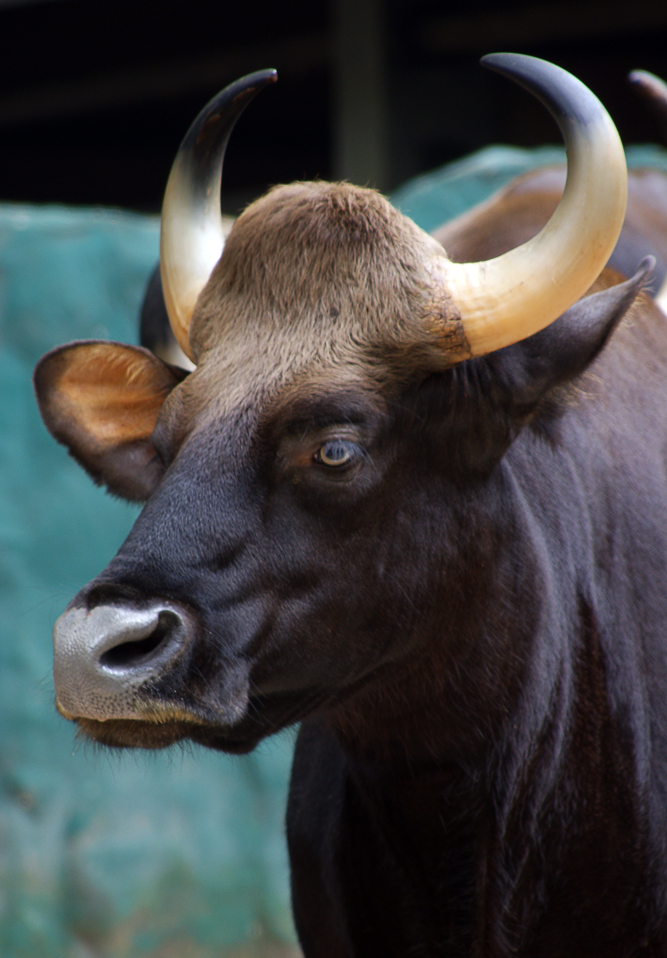 Seladang India (in Malay) at Zoo Negara, Malaysia. Read more at